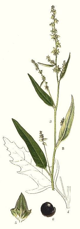 B. Atriplex patula L. ;Original Description:B. Gårdmålla, Atriplex patula L.